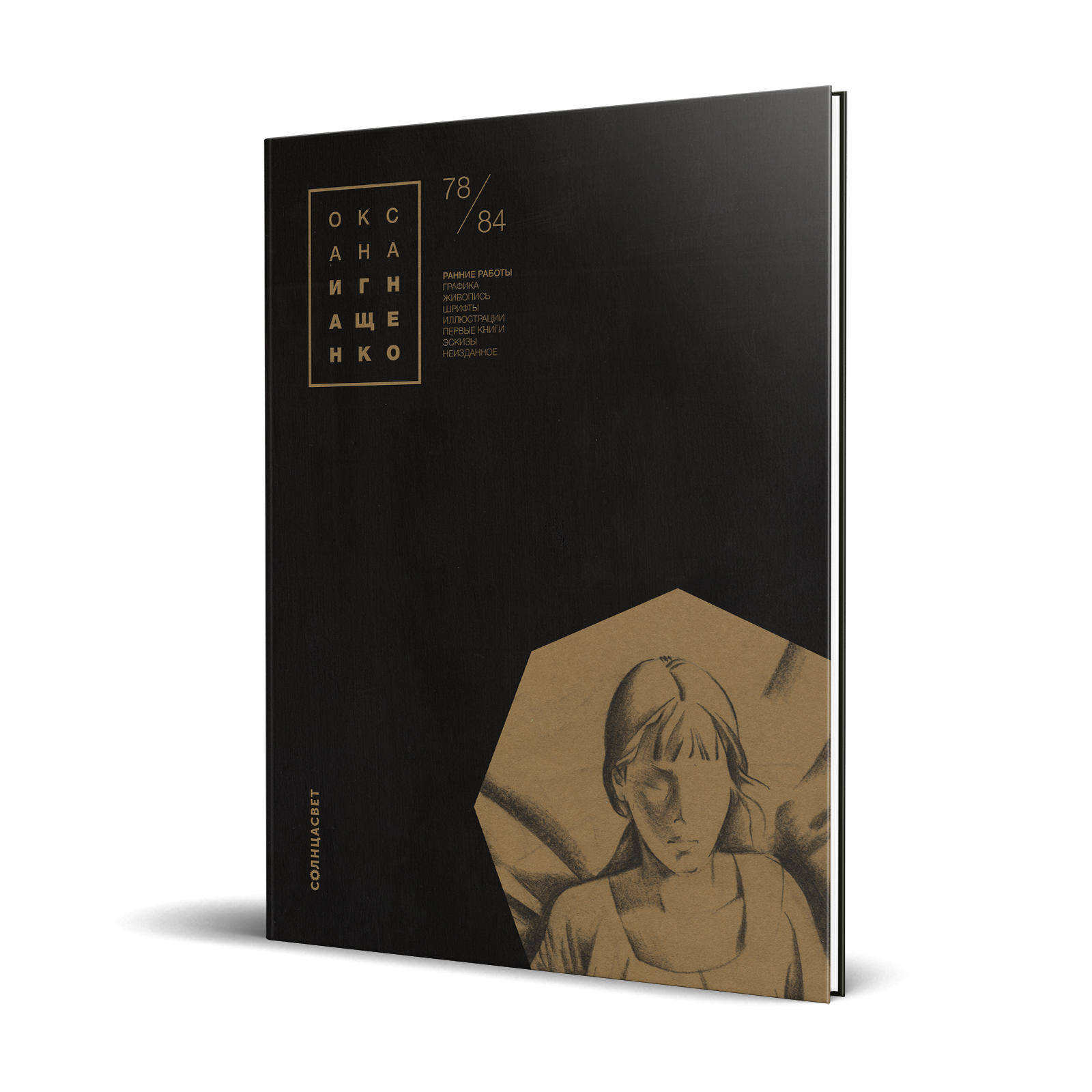 Живопись, графика, авторские шрифты, первые книги, эксперименты с различными стилями изобразительного искусства, неизданные работы, эскизы и многое другое. По этим работам будет исключительно любопытно прослеживать путь творческого развития от начинающей художницы до известного иллюстратора.